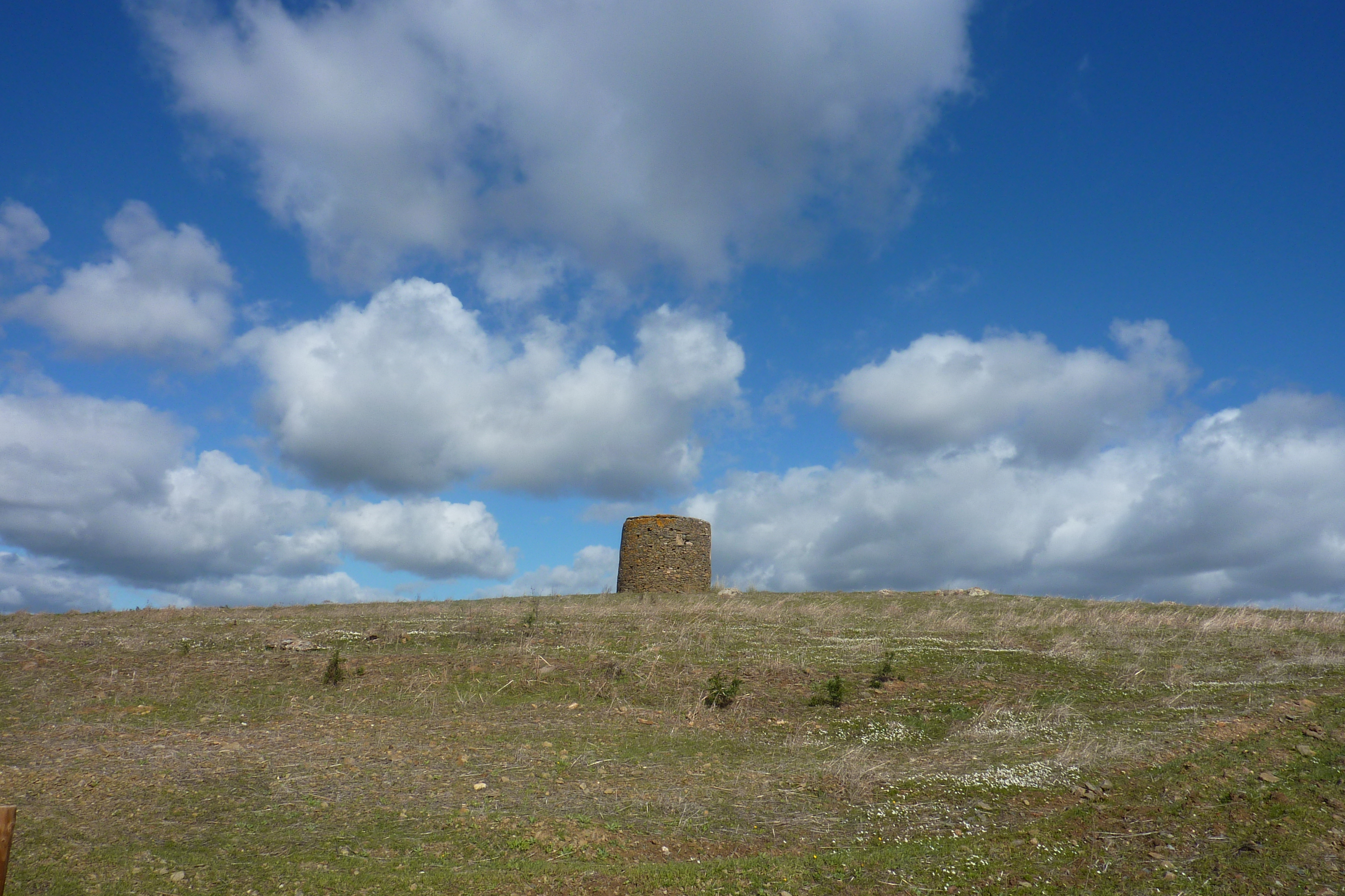 Algarve - Windmill